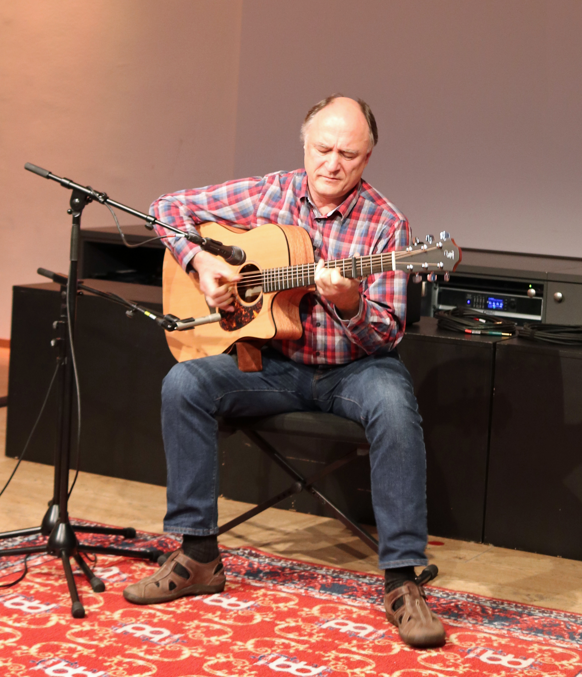 Perter Finger bei Musikhaus Thomann in Treppendorf